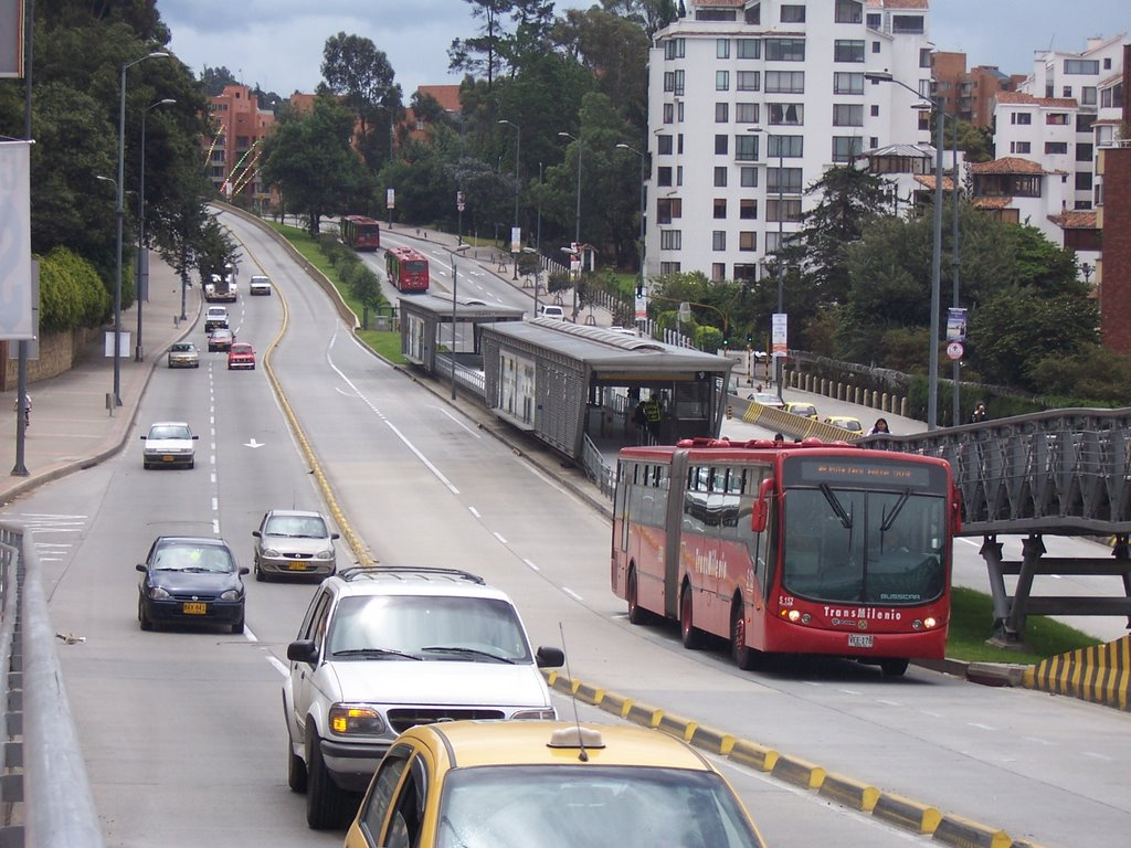 Estación de TM Gratamira